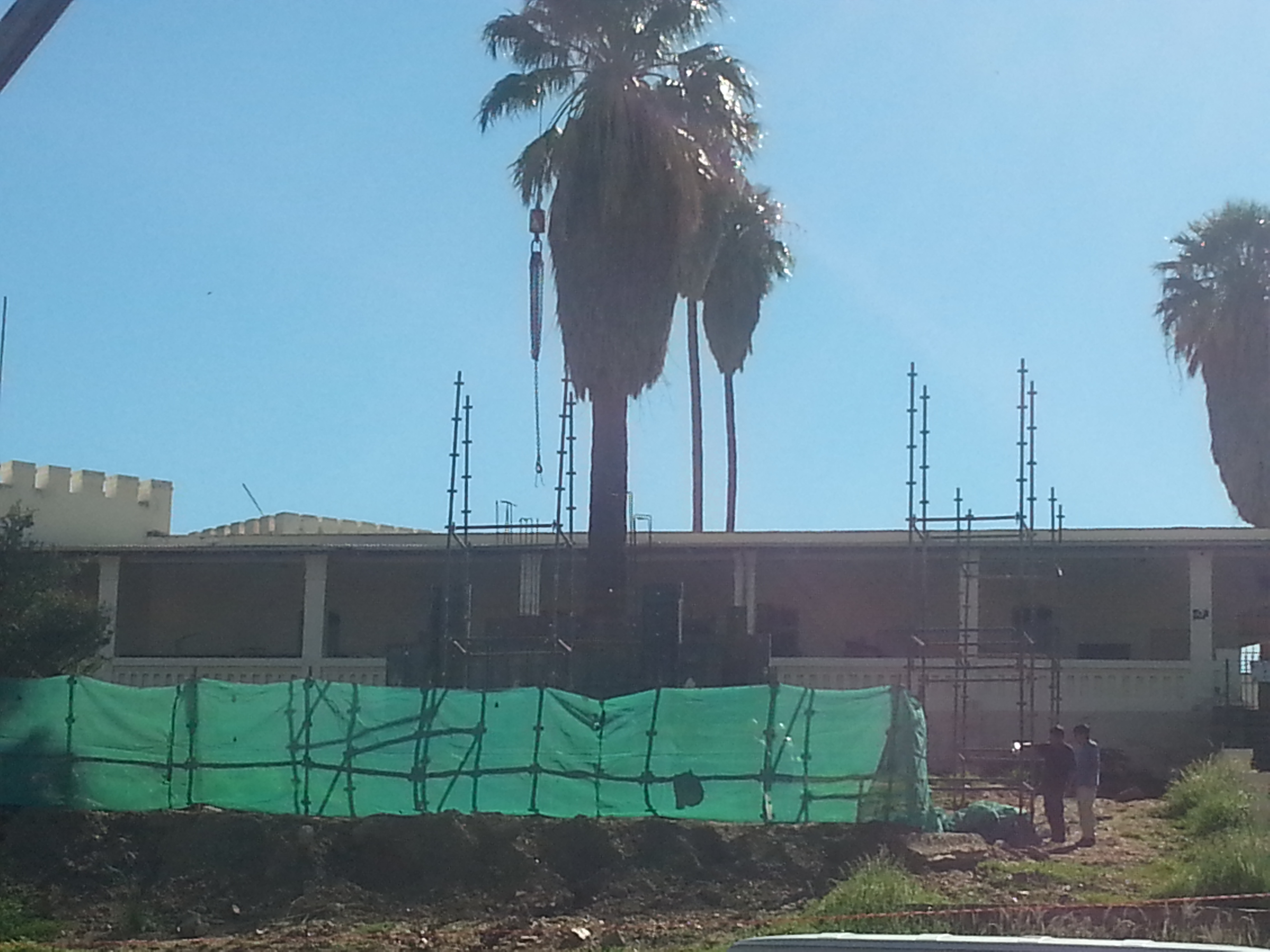 Bauarbeiten einer neuen Statue am ehemaligen Standort des Reiterdenkmal (Windhoek)